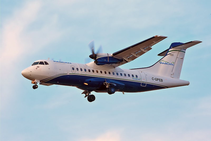 Pascan ATR 42-300 en vol, où